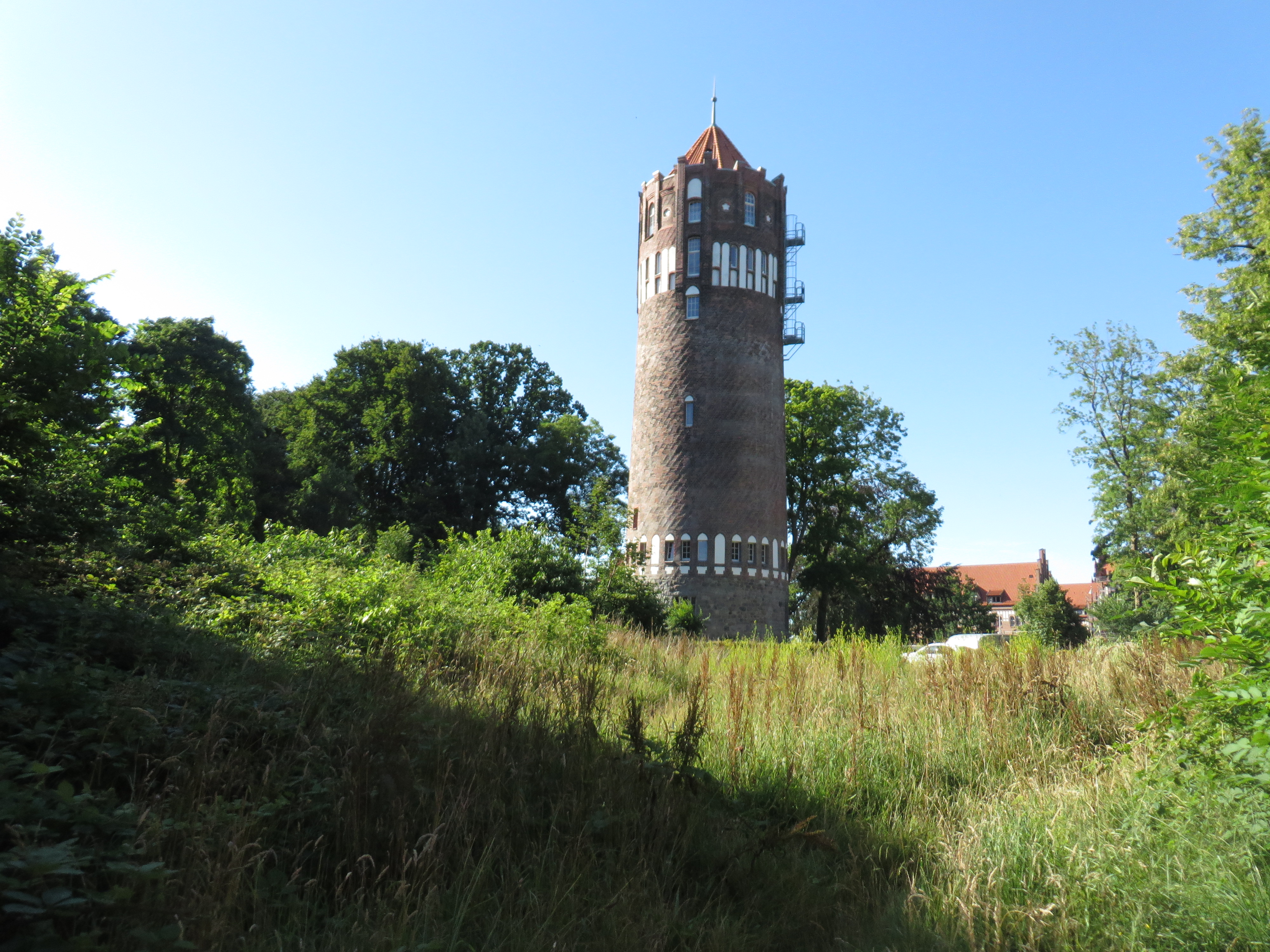 Marine-Wasserturm (Flensburg-Mürwik 20 Juli 2016)